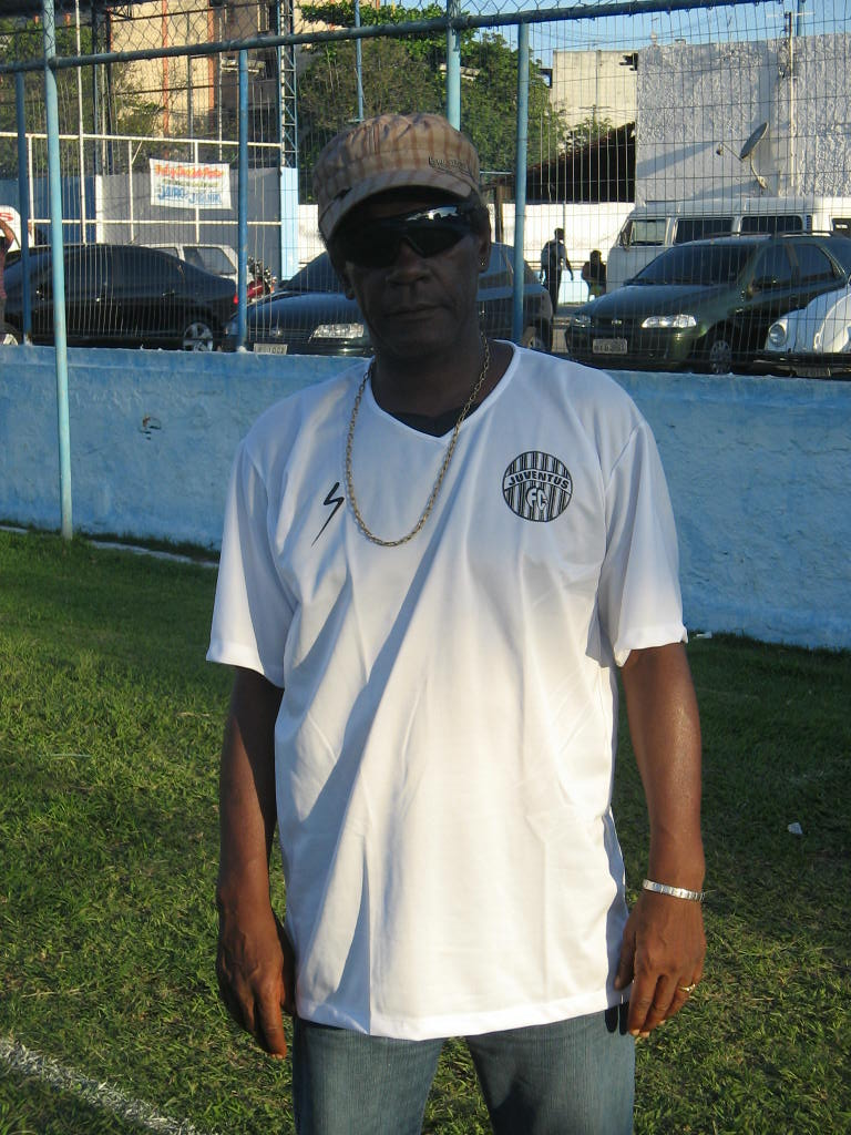 O ex-ponta direito do Bangu e da seleção brasileira Marinho, agora técnico de futebol